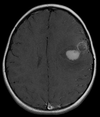 PNETs en paciente de niña de 5 años.